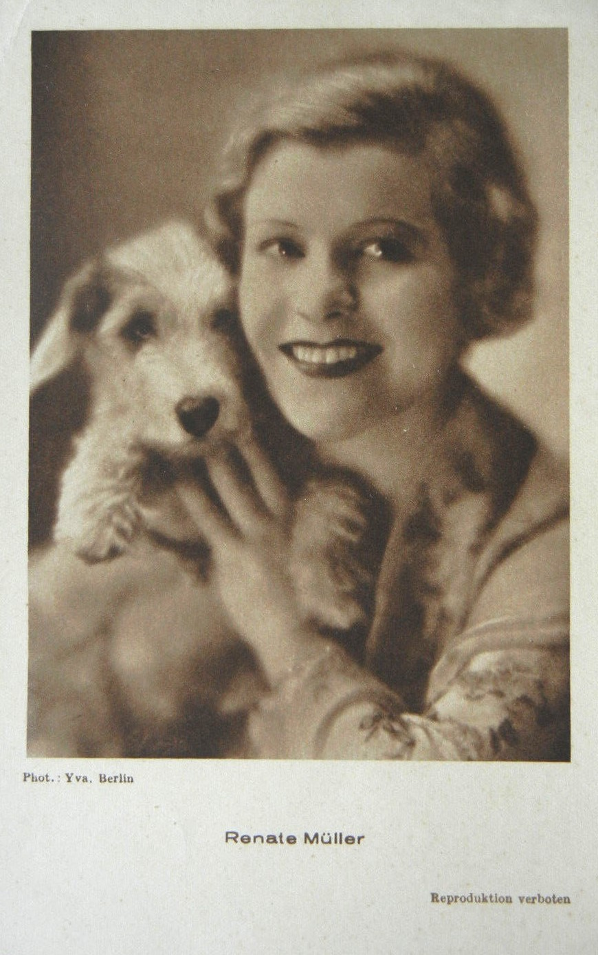 Renate Müller (Schauspielerin). Photopostkarte von Yva. (Beilage der Filmprogrammreihe "Programm von Heute")